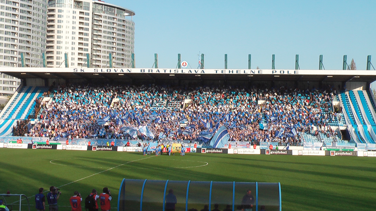 Futbalový štadión Tehelné pole